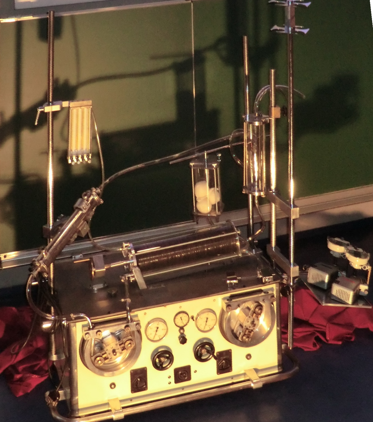 In Halle 1962 gebaute Herz-Lungen-Maschine